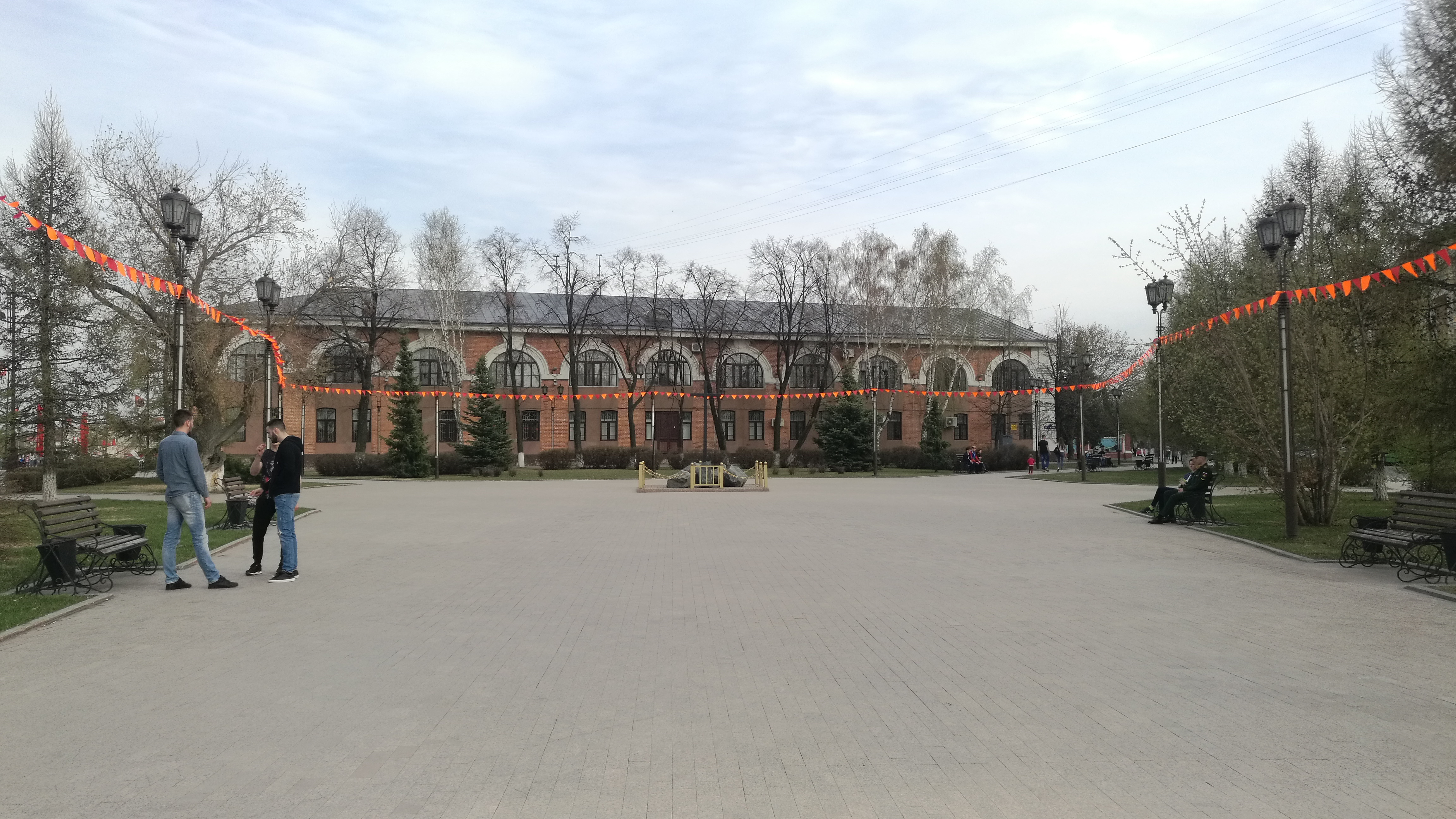 Gastokorto. Tjumeno, Rusio.